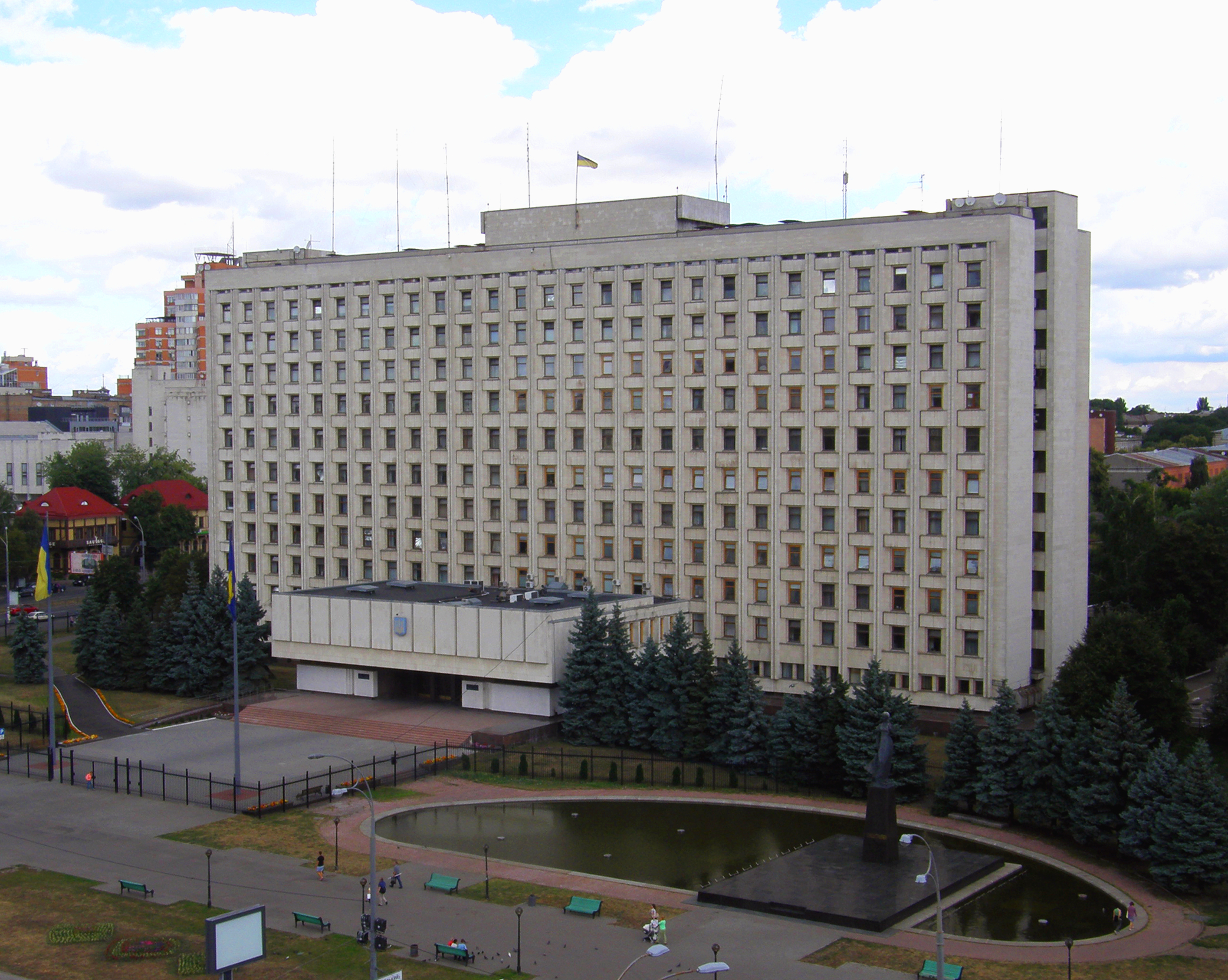 центральный избирательный комитет Украины и Киевская областная государственная администрация